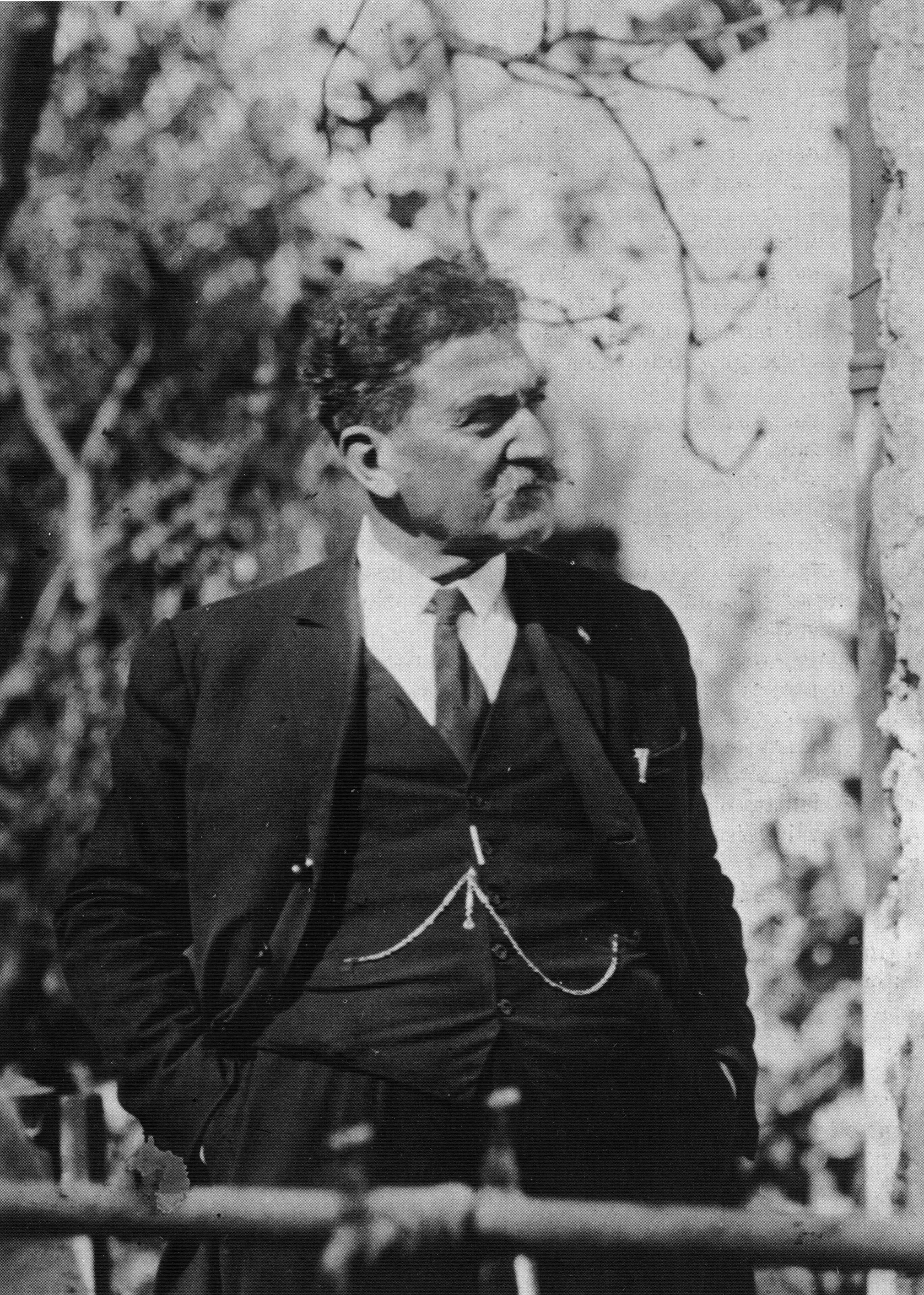 Onofrio Tomaselli in una fotografia degli anni Trenta.